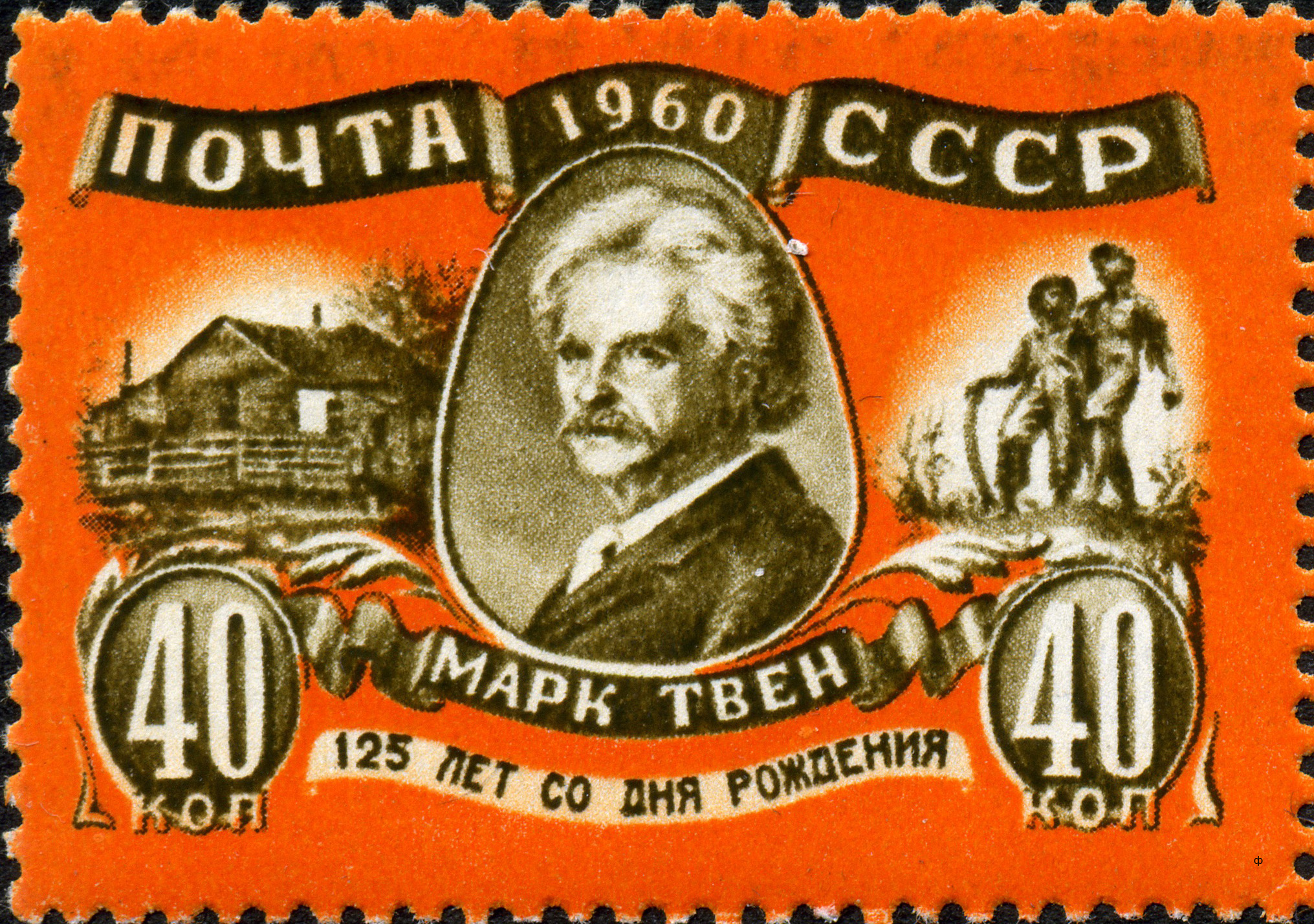 Марка СССР. ЦФА 2503. Домик во Флориде, где родился писатель